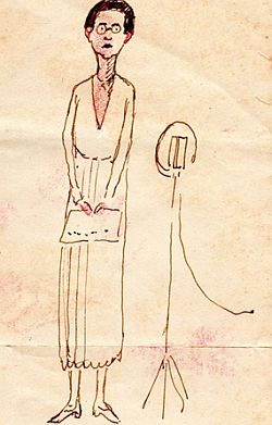 Albertine van der Meulen, tekening van Lodewijk Schelfhout